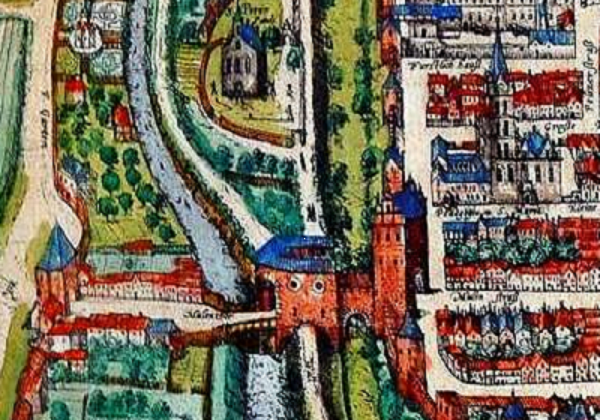 Fragment Alten Stettin-3